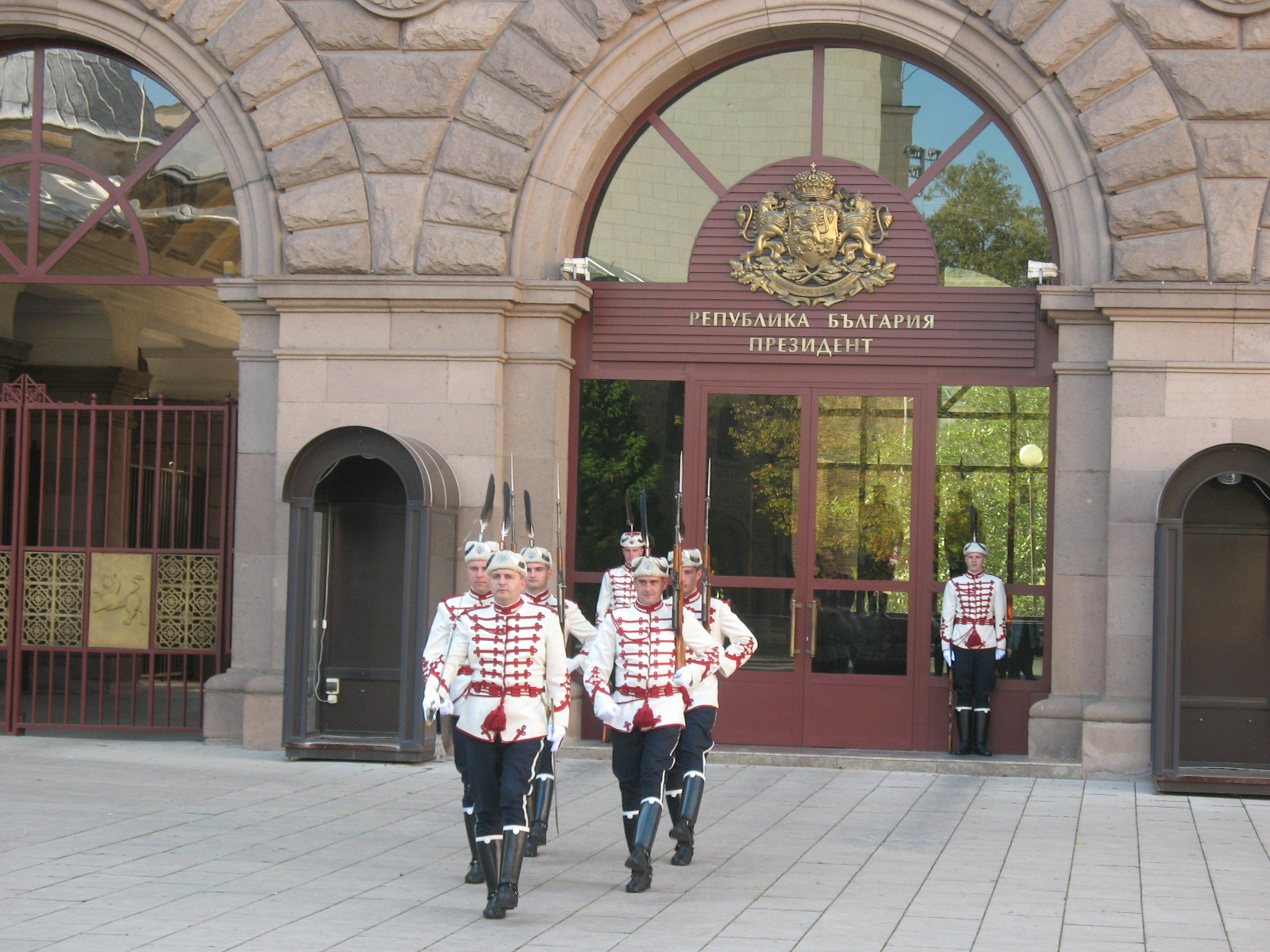 Смена караула у президентского дворца в Софии